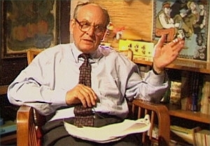 Günter Särchen, aufgenommen im Rahmen eines Interviews im Jahr 1998 für das Forschungsprojekt 'Katholische Filmarbeit in der DDR' unter Betreuung von Prof. Dr. theol. Josef Müller, Institut für Praktische Theologie an der Albert-Ludwigs-Universität Freiburg im Breisgau, dann Prof. Dr. phil. Lic. theol. habil. Linus Hauser vom Institut für Katholische Theologie an der Justus-Liebig-Universität Giessen und Hussite Faculty of Theology an der Charles University Praha.